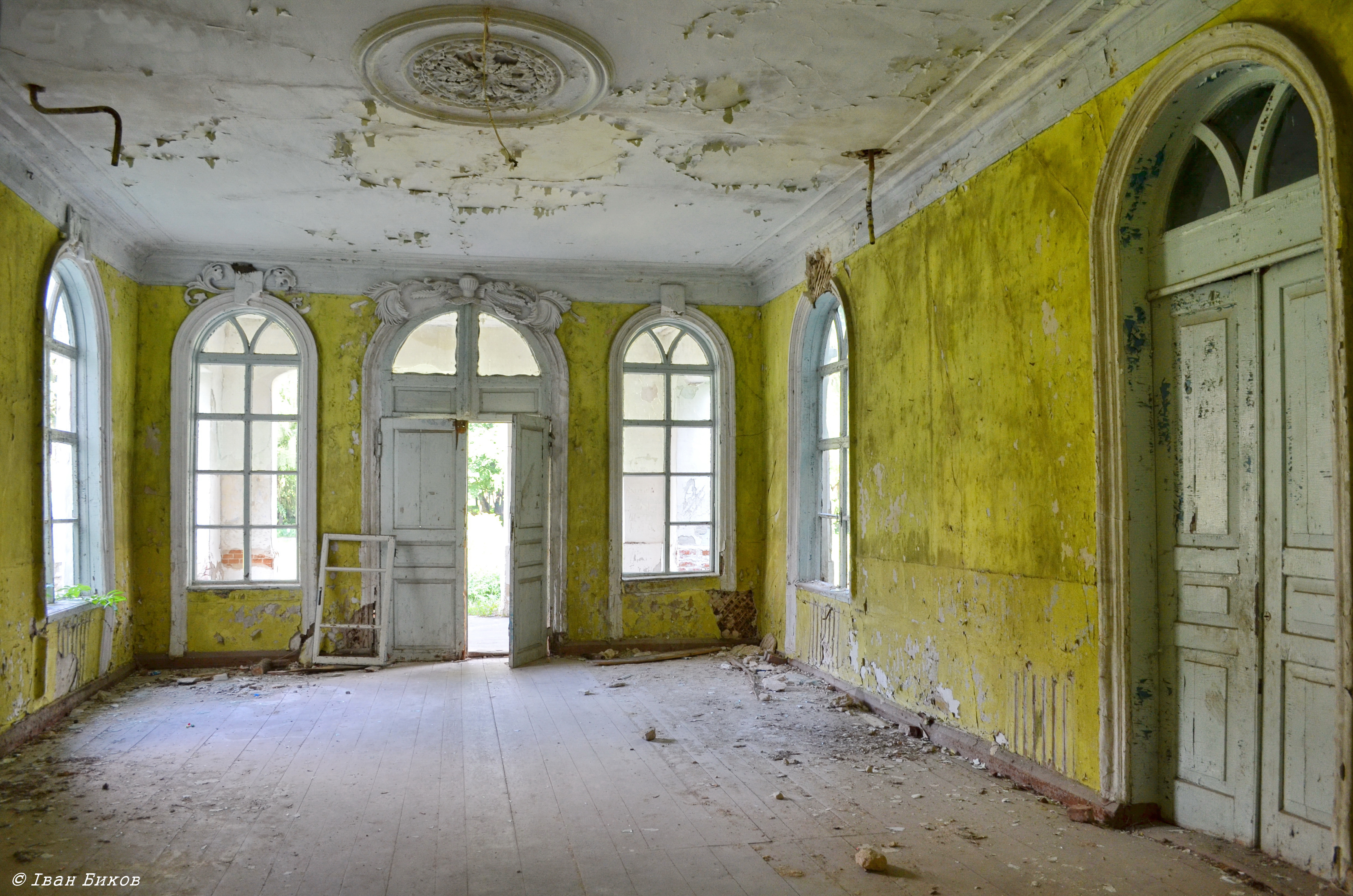 Садиба декабристів Муравйових-Апостолів, Хомутець